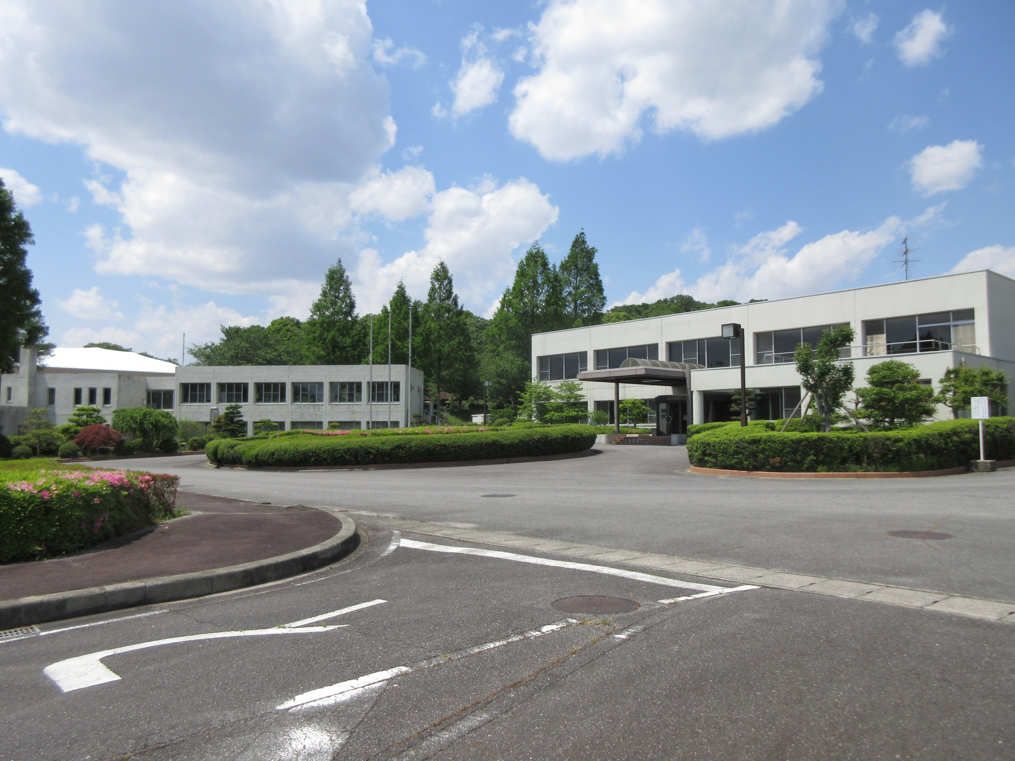 愛知県畜産総合センター（岡崎市丸山町）